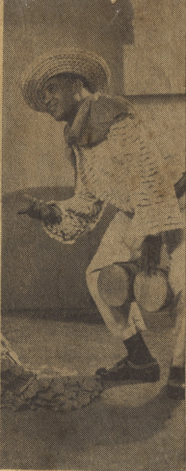 Recorte de prensa mostrando al cantante afrouruguayo Oscar Rorra (1890 - 1950), en una de sus caracterizaciones de músico cubano.